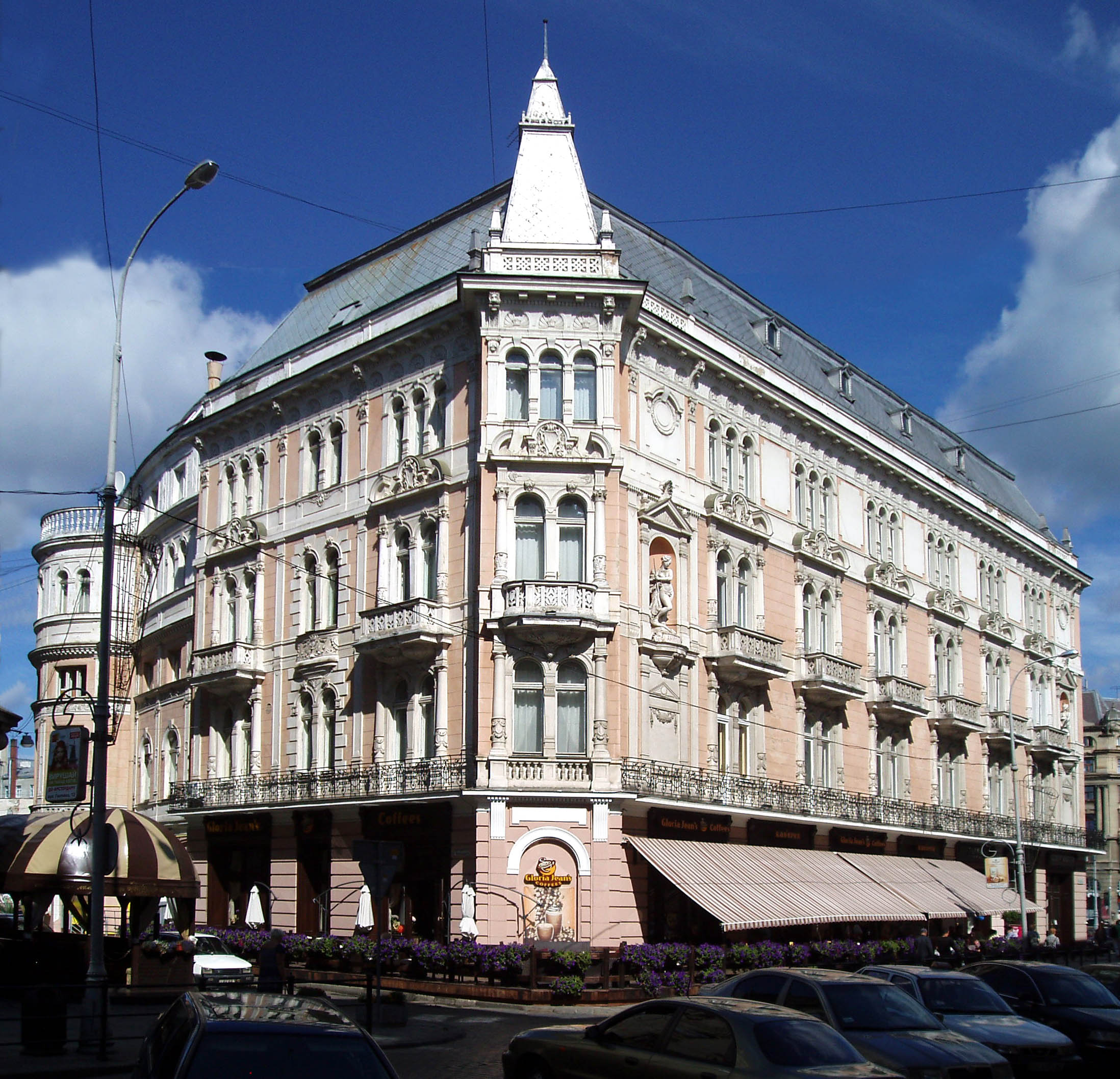 Готель «Жорж» у Львові. Збудований 1899 року за проектом бюро Фельнера і Гельмера, за участі Івана Левинського і Юліана Цибульського.